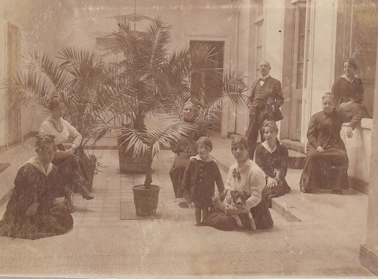 Esta fotografía es de 1930 tomada en patio interior de la Casa de Pedro Nolasco Cruz Vergara con su familia. Esta casa estaba ubicada en Calle Huérfano , centro de Santiago de Chile.